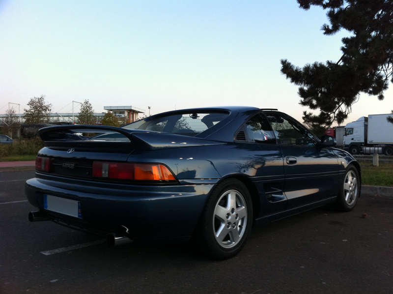 Toyota MR2 MKII sw20, moteur 3S GE, revision 2